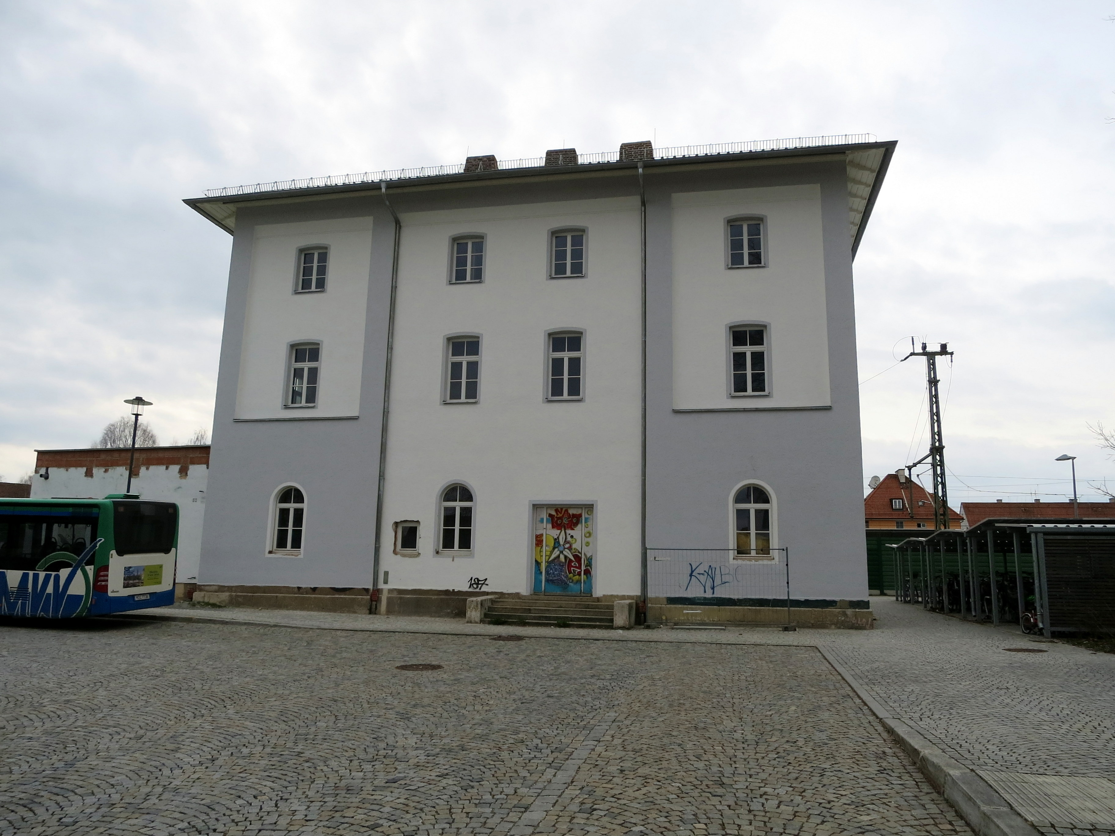 Im 19. Jahrhundert wurde dieser Bahnhof gebaut.